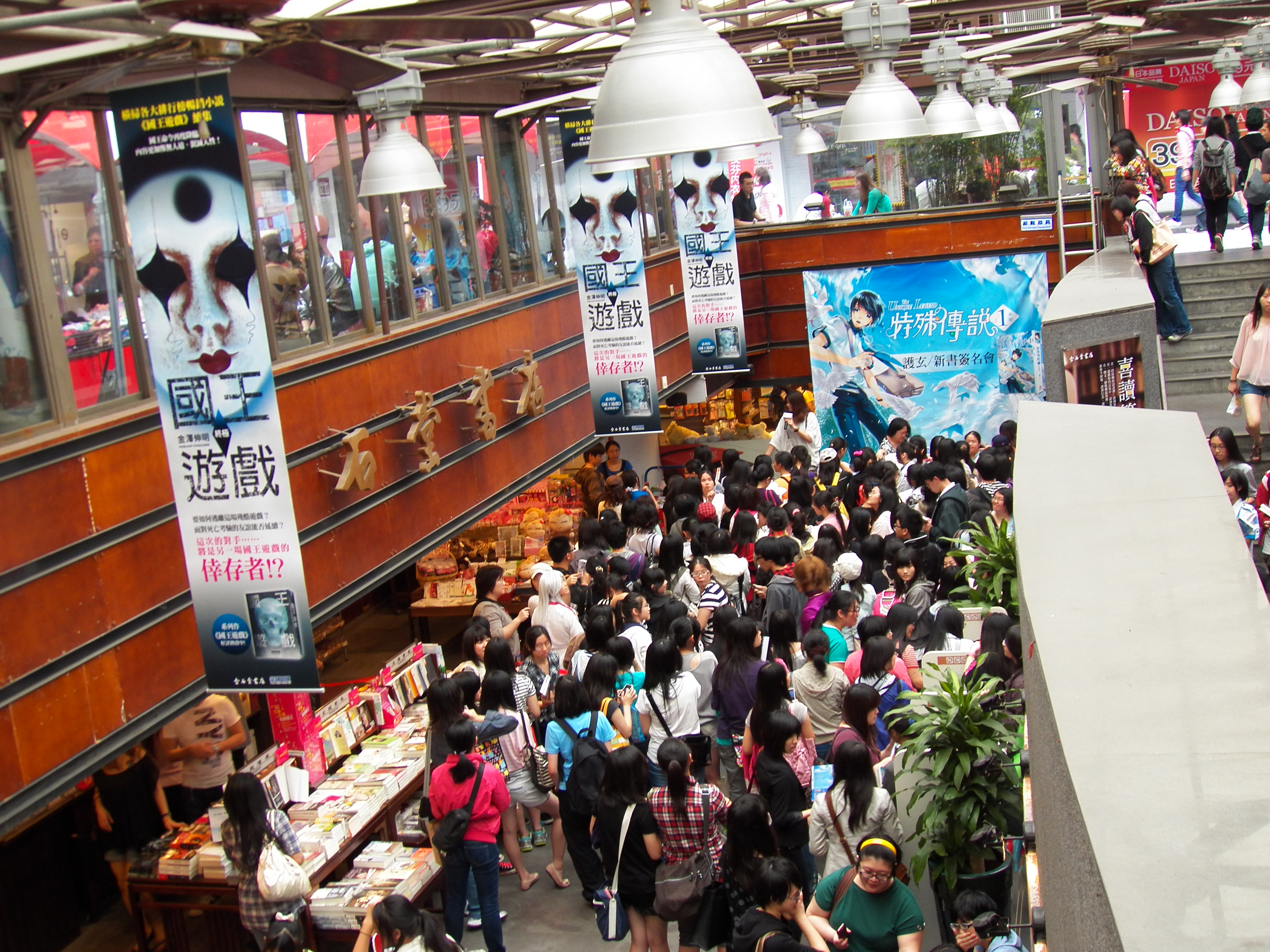 台湾のライトノベル作家・護玄の新書サイン会。